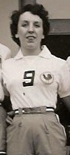 French women's basketball team 1953: Anne-Marie Colchen (#7), Édith Tavert-Kloechner (#9), Gisèle Roques (#3), Alice Sellier (#14), Paulette Neyraud (#12), Andrée Henry-Lucq (#11), Evelyne Golhen (#5), Eliane Savelli (#8), Micheline Bejaud (#13), Jacqueline Biny (#6), Odette Roques (#10), Thérèse Marfaing (#4).